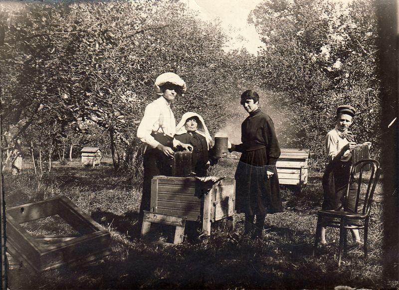 Gabrielė Petkevičaitė-Bitė in her apiary (Puziniškis Manor, Panevėžys district) with Antanas Kasperavičius and his wife and Petkevičaitė's nephew